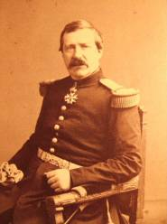 Charles Dejean, général français (1807-1872) Title